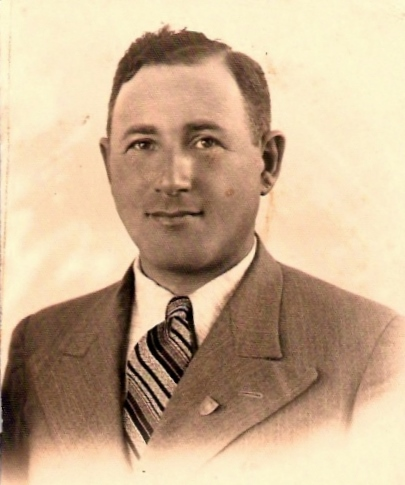 אברהם מברך